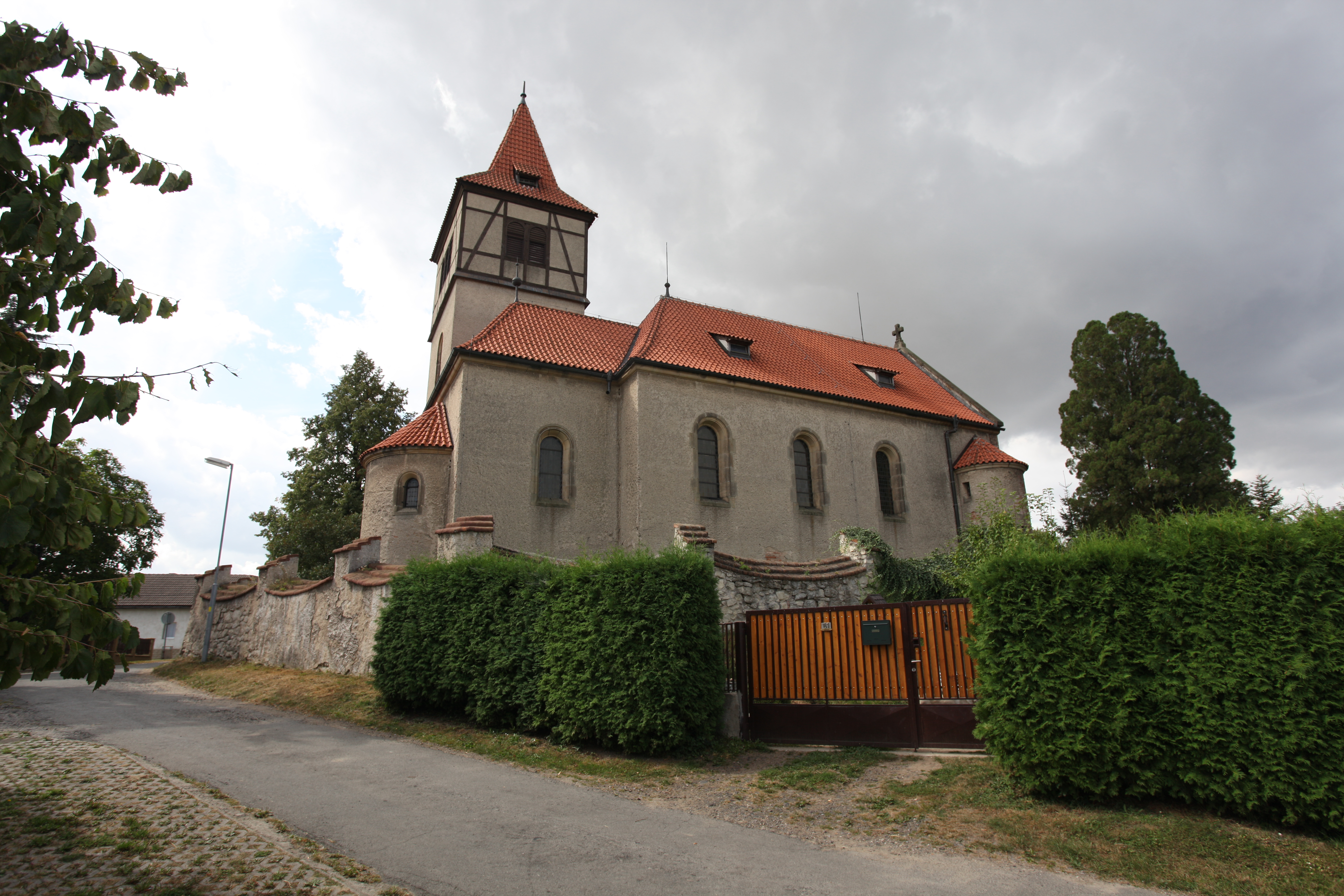 Mečeříž, kostel Povýšení svatého Kříže